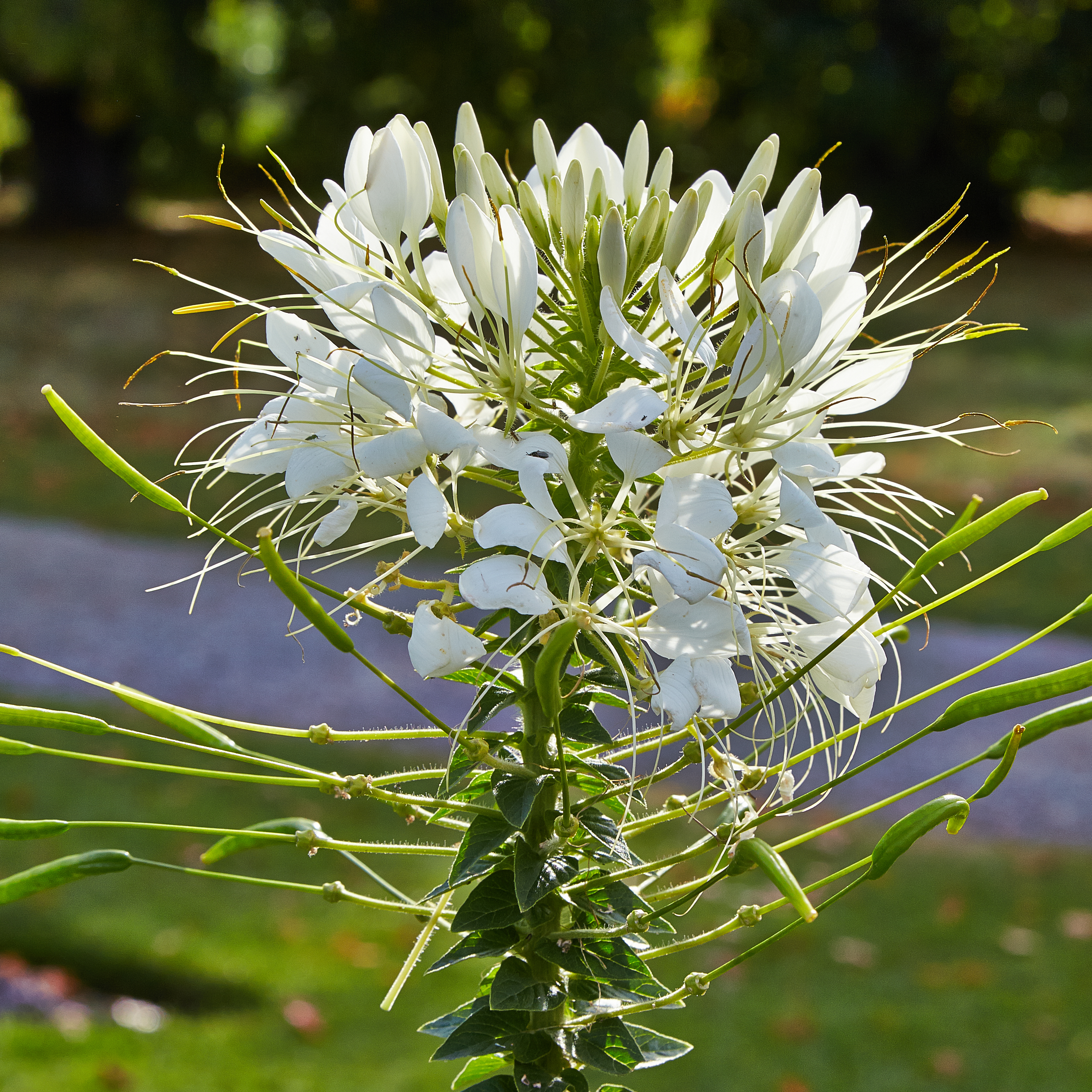 Cleome houtteana identifierad med hjälp av skylt i Bergianska trädgården.